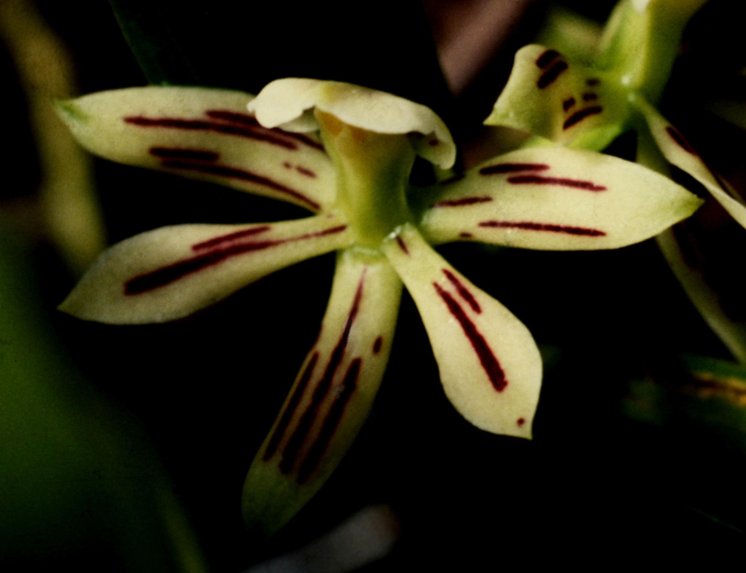 Encyclia calamaria , Suriname.